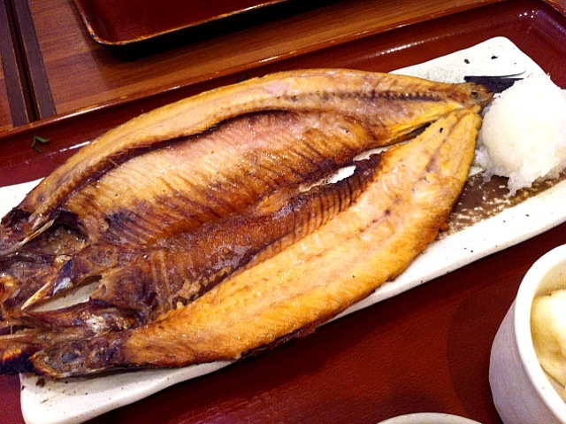 今日のランチはにしんの開き。#lunch at 焼魚食堂 魚角 大久保店 via SnapDish